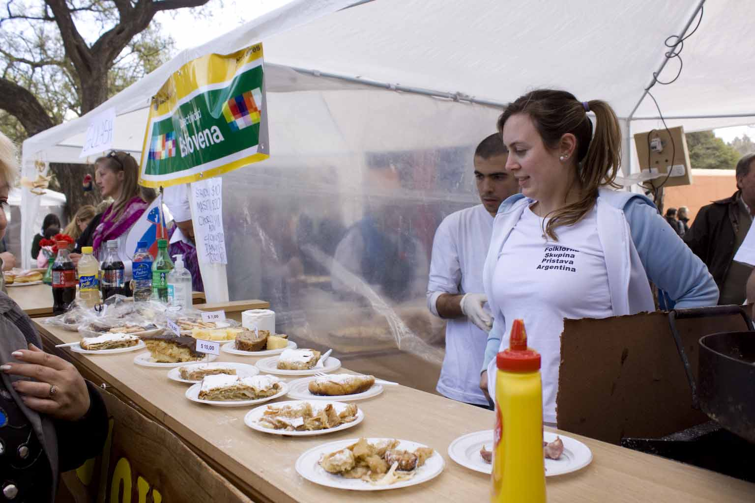 Dia del inmigrante 125